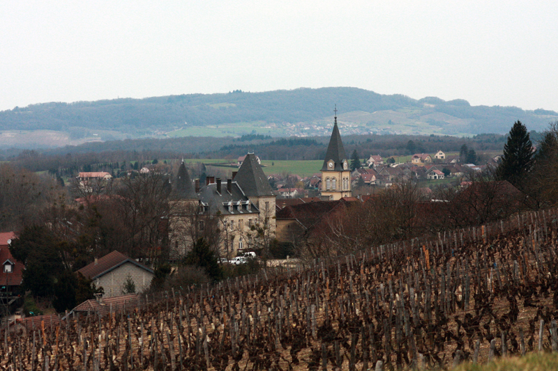 La vigne au repos